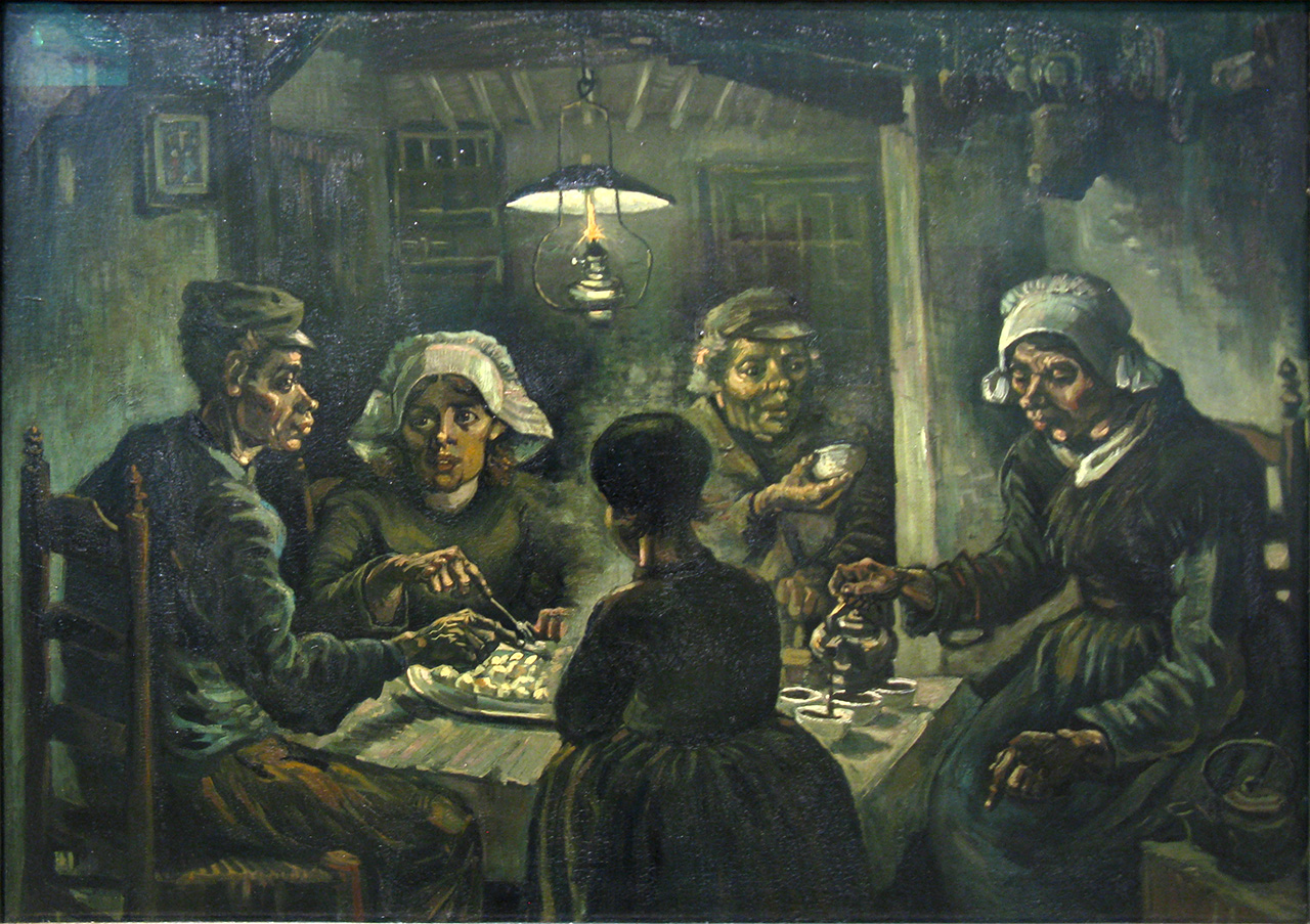 De aardappeleters, 1885 Vincent van Gogh (1853-1890) Olieverf op doek, 82 X 114 cm Van Gogh Museum, Amsterdam (Vincent van Gogh Stichting) F 82